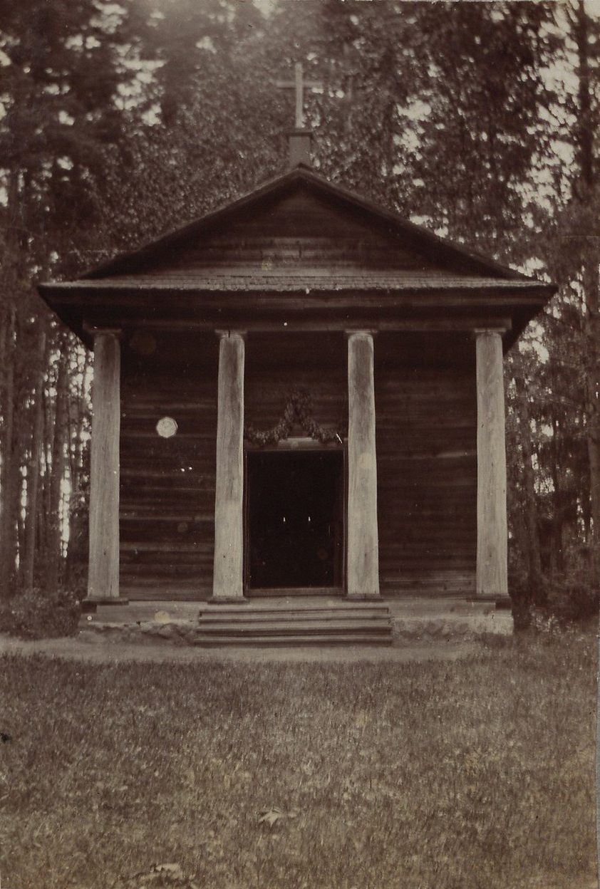 Беларуская (тарашкевіца): Абчуга (Abčuha), капліца на могілках